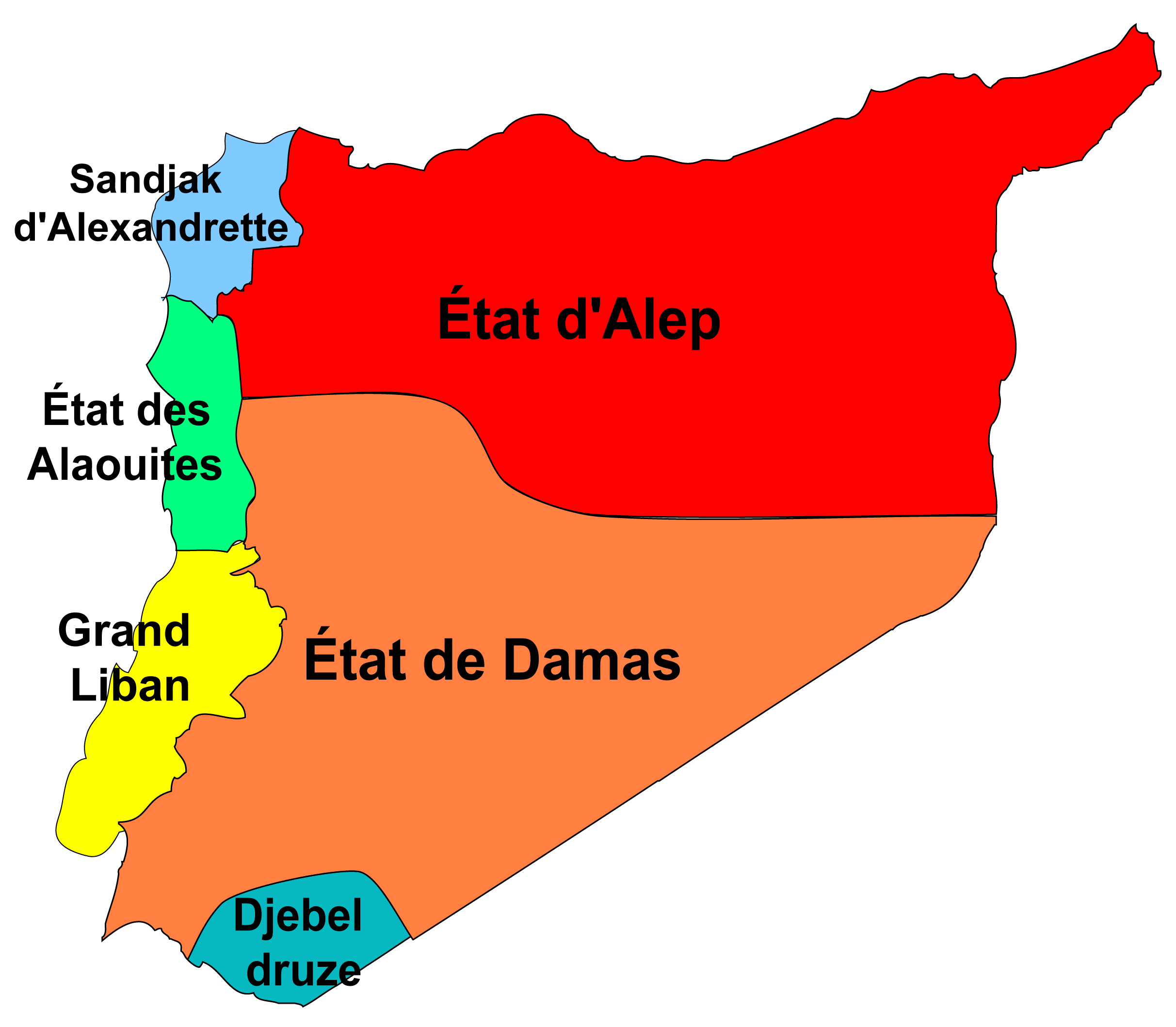 Carte des zones autonomes sous le mandat français de Syrie avant 1937 (et plus particulièrement 1923): Liban, Alep, Damas, Alexandrette (Hatay), Alaouites.